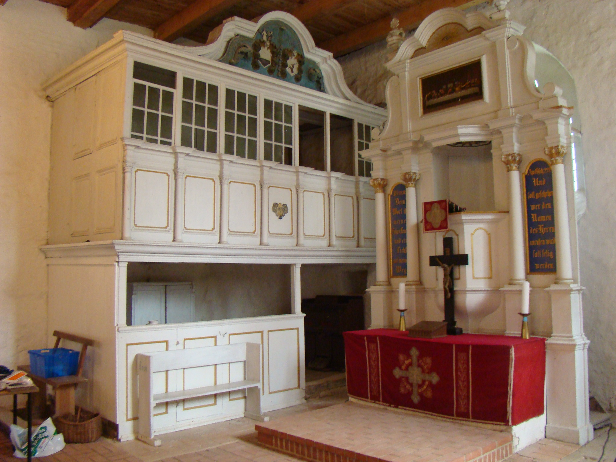 Dorfkirche in Lütgendorf (Klocksin), Kanzelatar und Patronatsgestühl. Foto: Peter Schmelzle, August 2011.